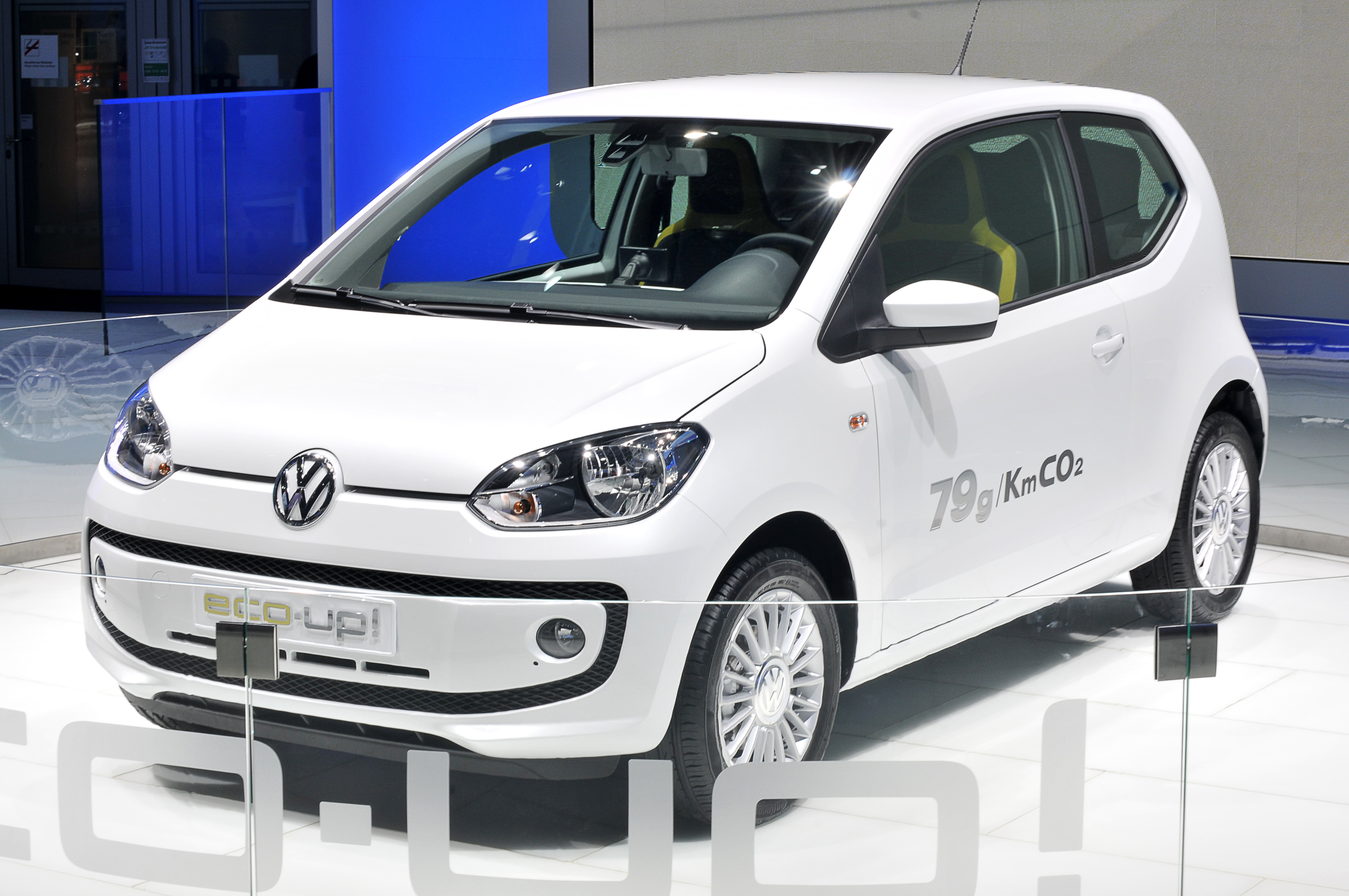 Volkswagen eco-up! auf der IAA 2011